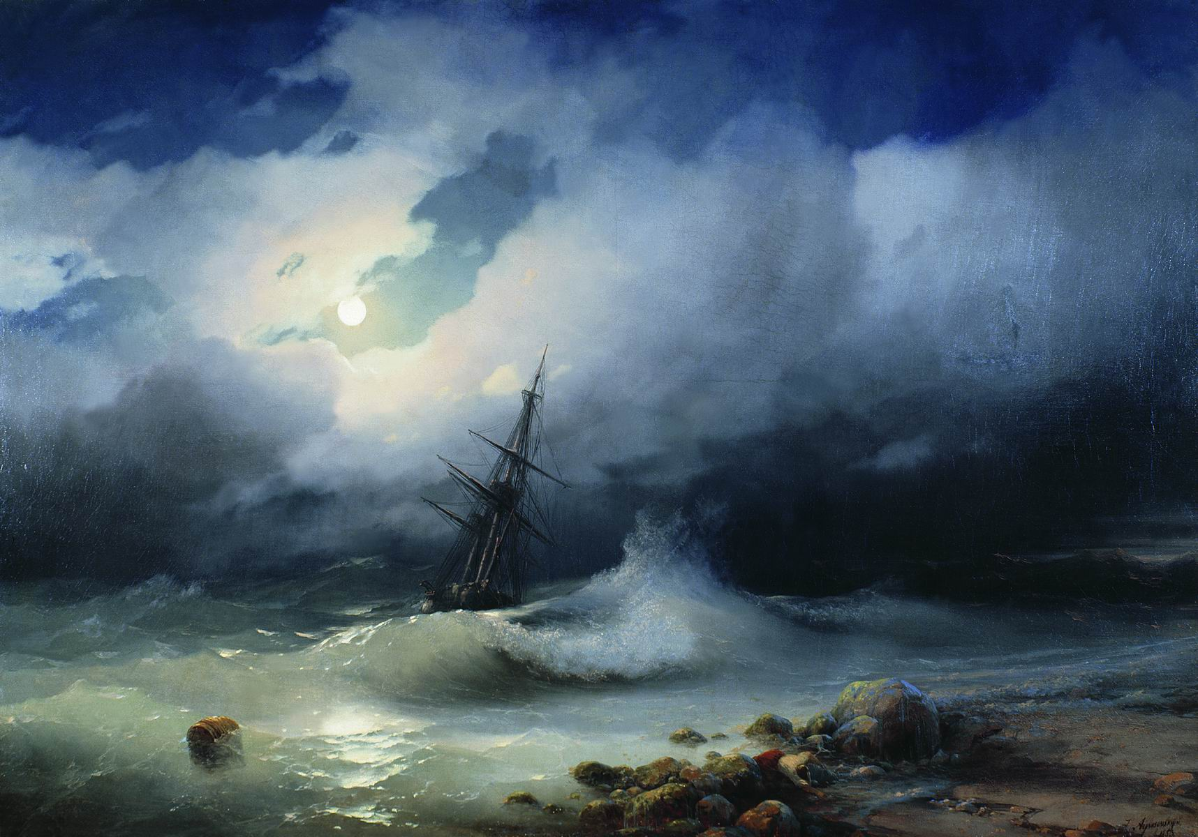 Бурное море ночью. 1853 Холст, масло. 82х117см. Частное собрание